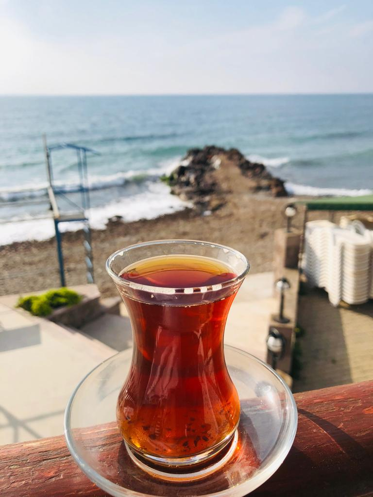 شاي في شاطئ بحر مرمرة في مدينة جناق قلعة